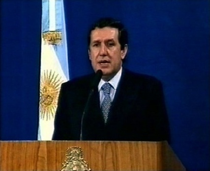 Presidente de la Nación Argentina. Como Presidente Provisional del Senado, asume debido a la renuncia del Vicepresidente Carlos Álvarez y en virtud de la Ley de Acefalía del Poder Ejecutivo. Mandato: 21 de diciembre de 2001 al 23 de diciembre de 2001.